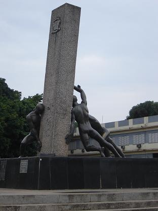 Foto do Monumento às Três Raças, situado na Praça Cívica, junto ao Palácio das esmeraldas, no centro de Goiânia.